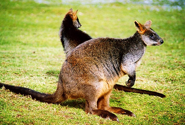 Sumpf-Wallaby im Zoo von Zürich